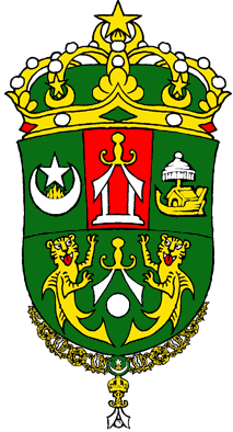 Royal Order of the Peal - Crest